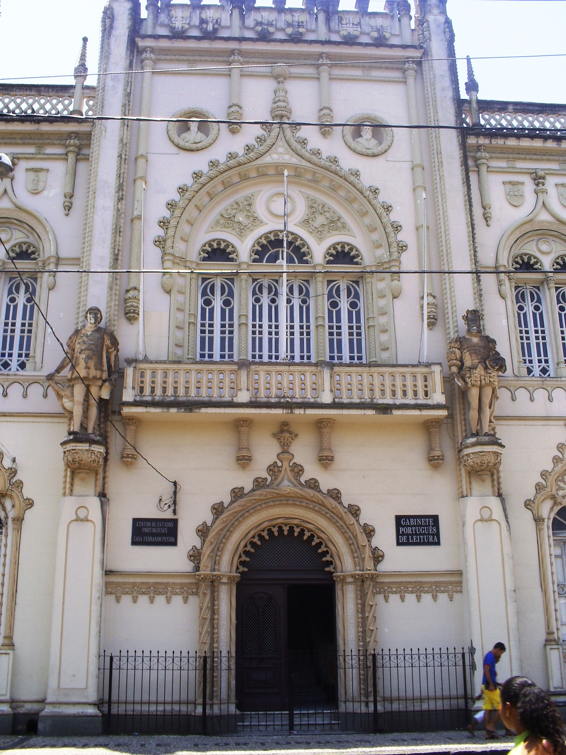 Foto da Biblioteca Gabinete Português de Leitura, Salvador, Bahia, Brasil.